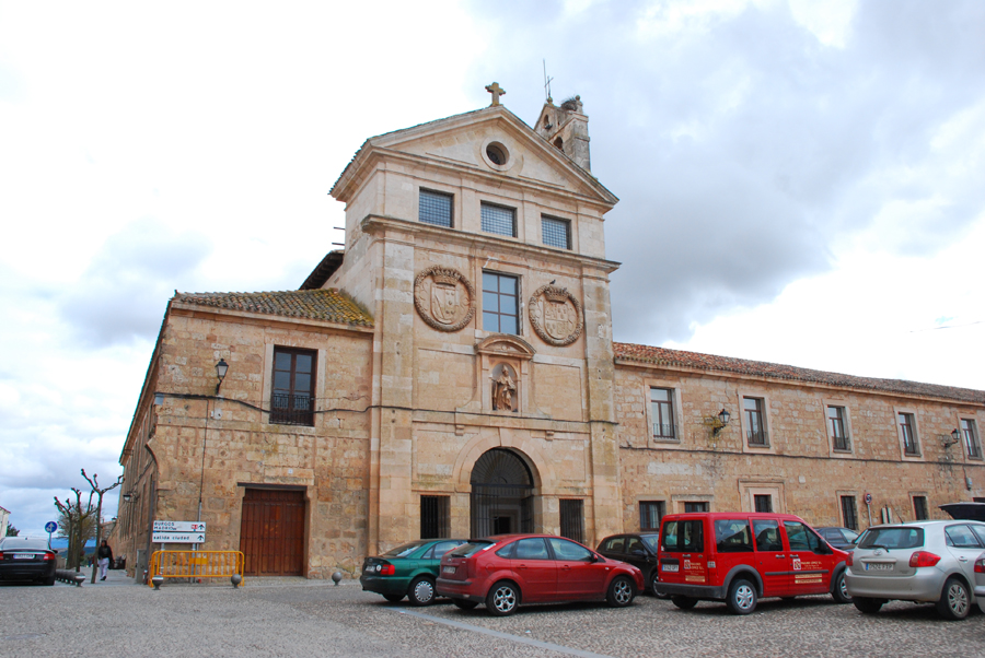 Convento de San Blas, Lerma, Burgos, España